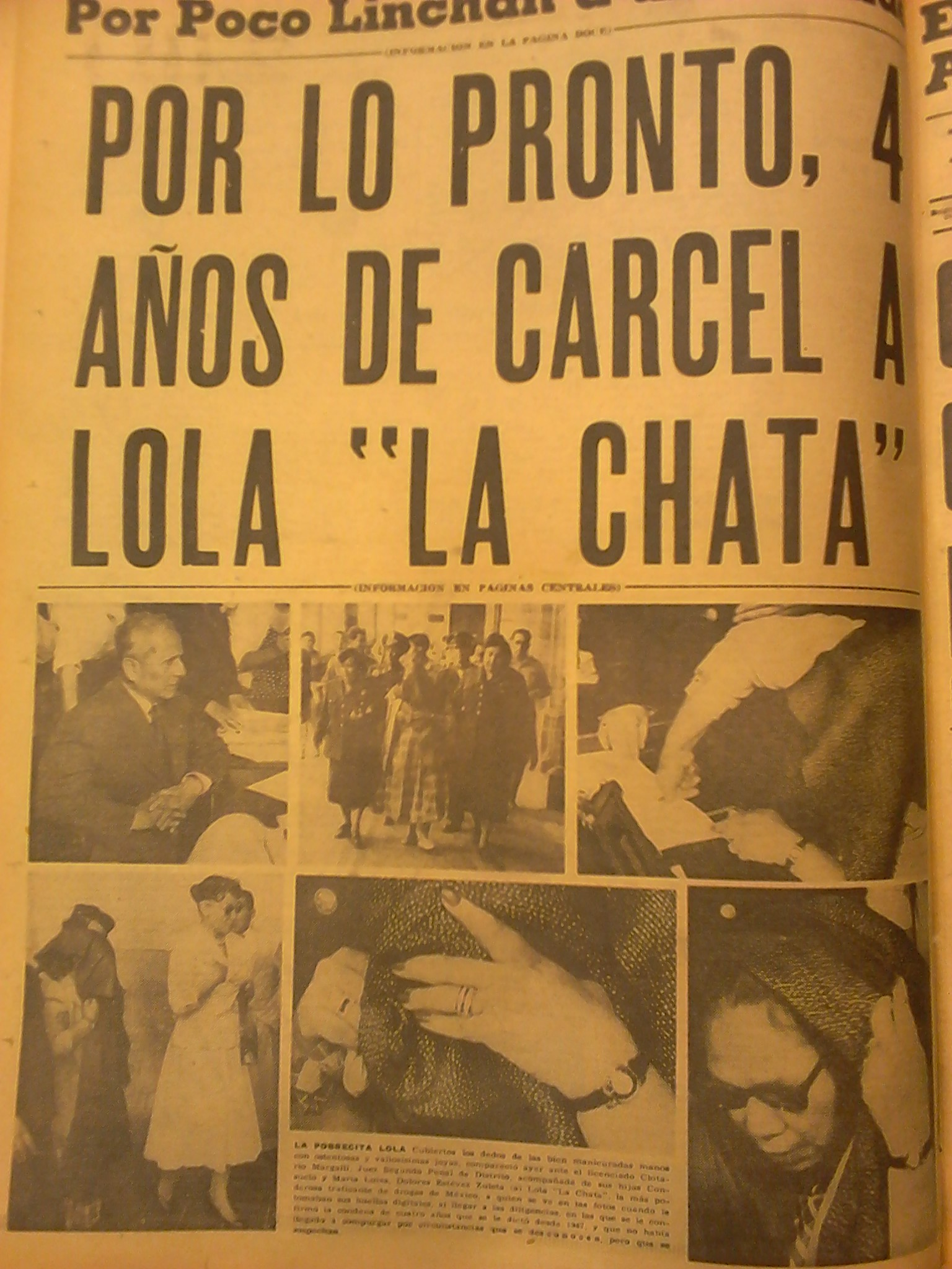 Lola la Chata